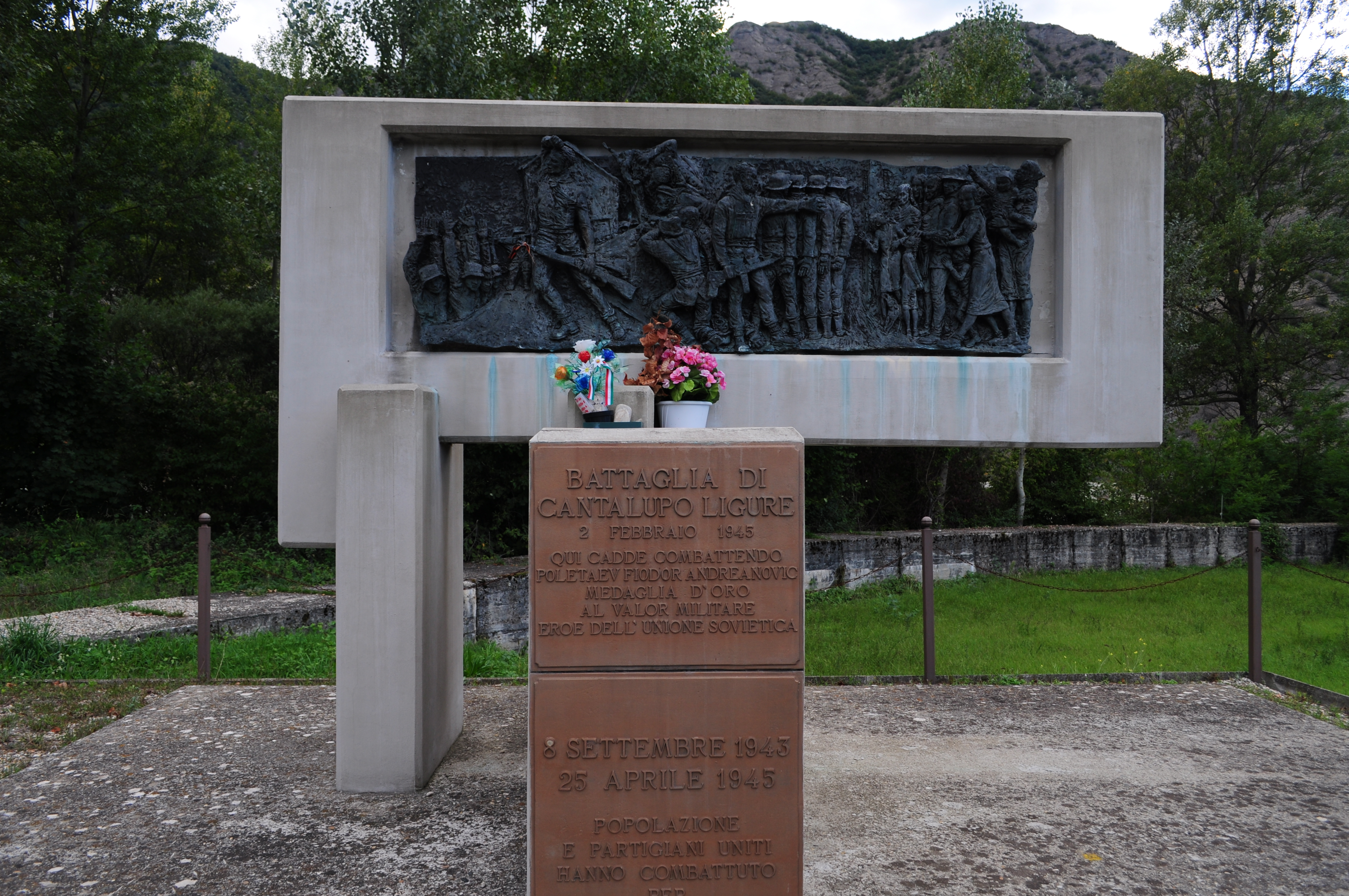 Monumento al partigiano sovietico Fjodor A.P. in località Cantalupo Ligure